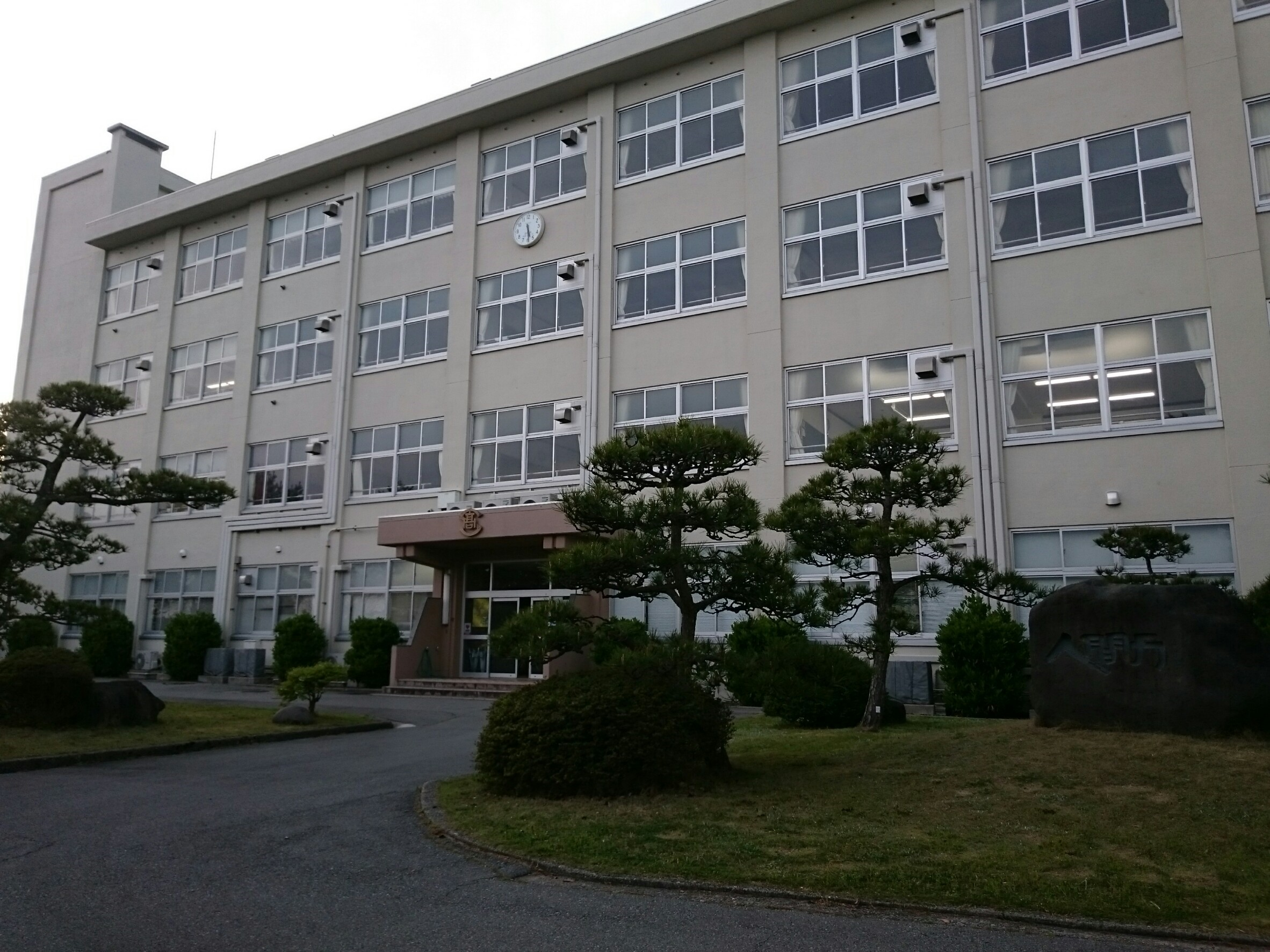 新潟県立佐渡高等学校の校舎1棟を正面から撮影